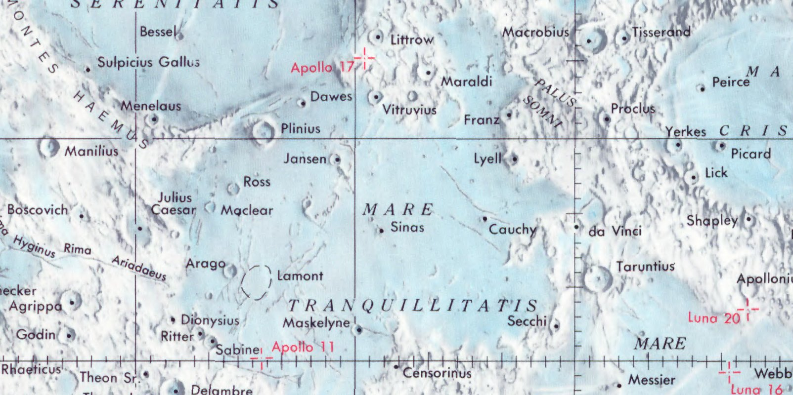 Cráter lunar Sinas. Localización. (Lunar Chart LPC1. Second Edition)